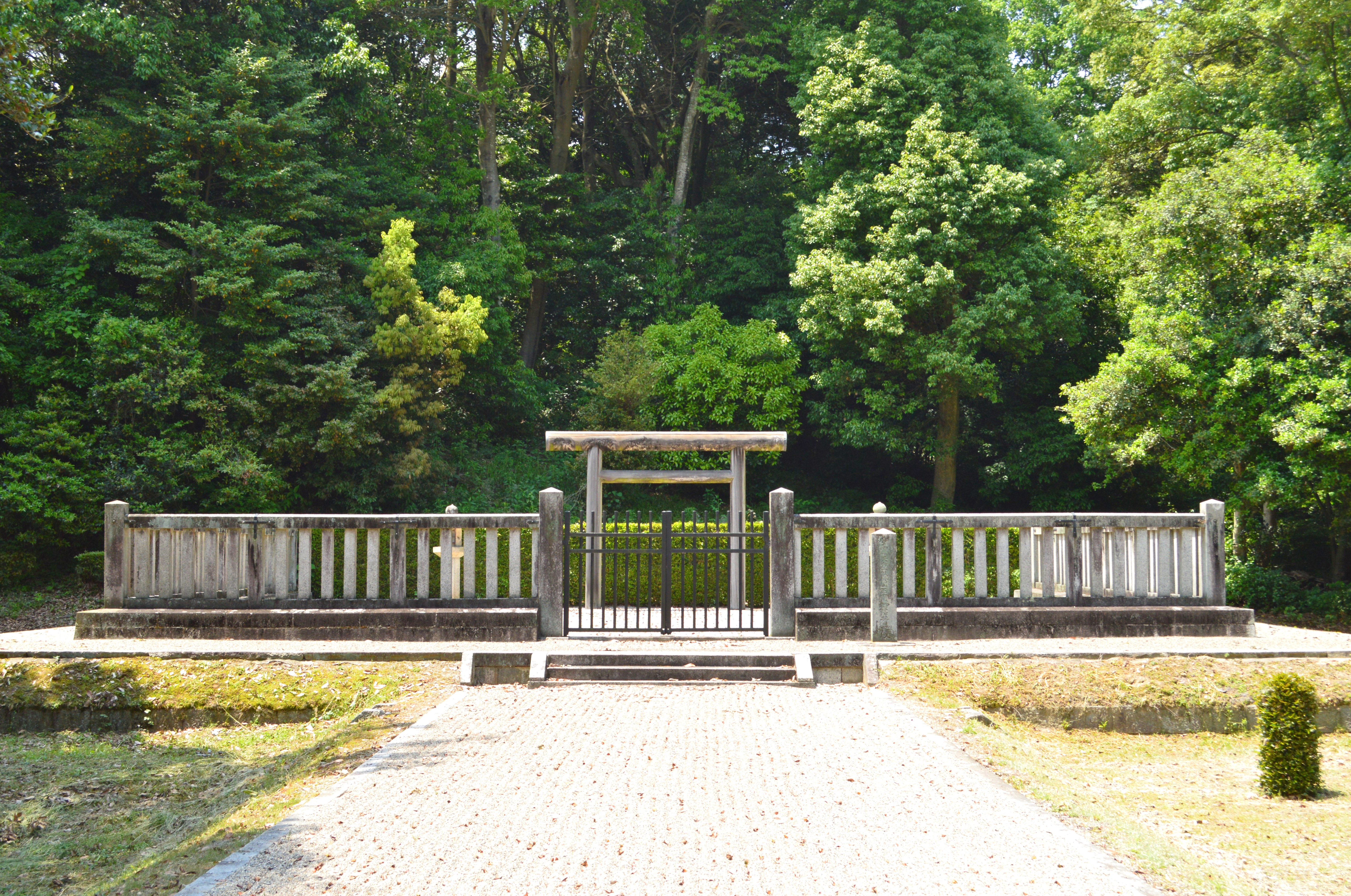 安寧天皇畝傍山西南御陰井上陵 拝所